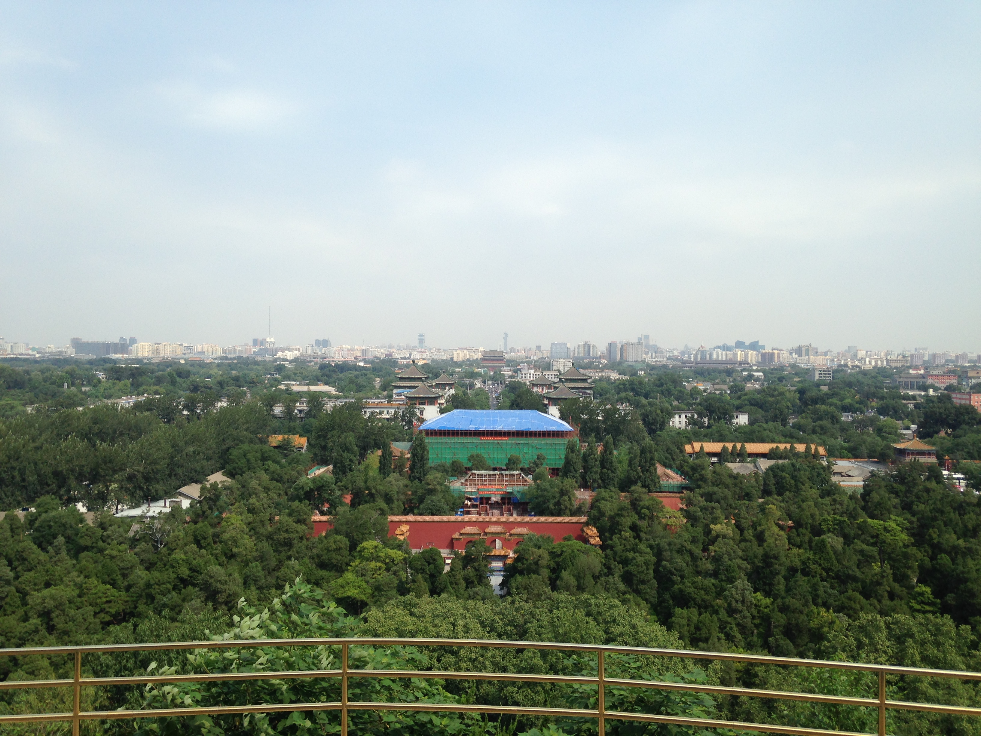 景山公園の万春亭より北方向を望む